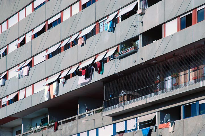 Corviale, Roma